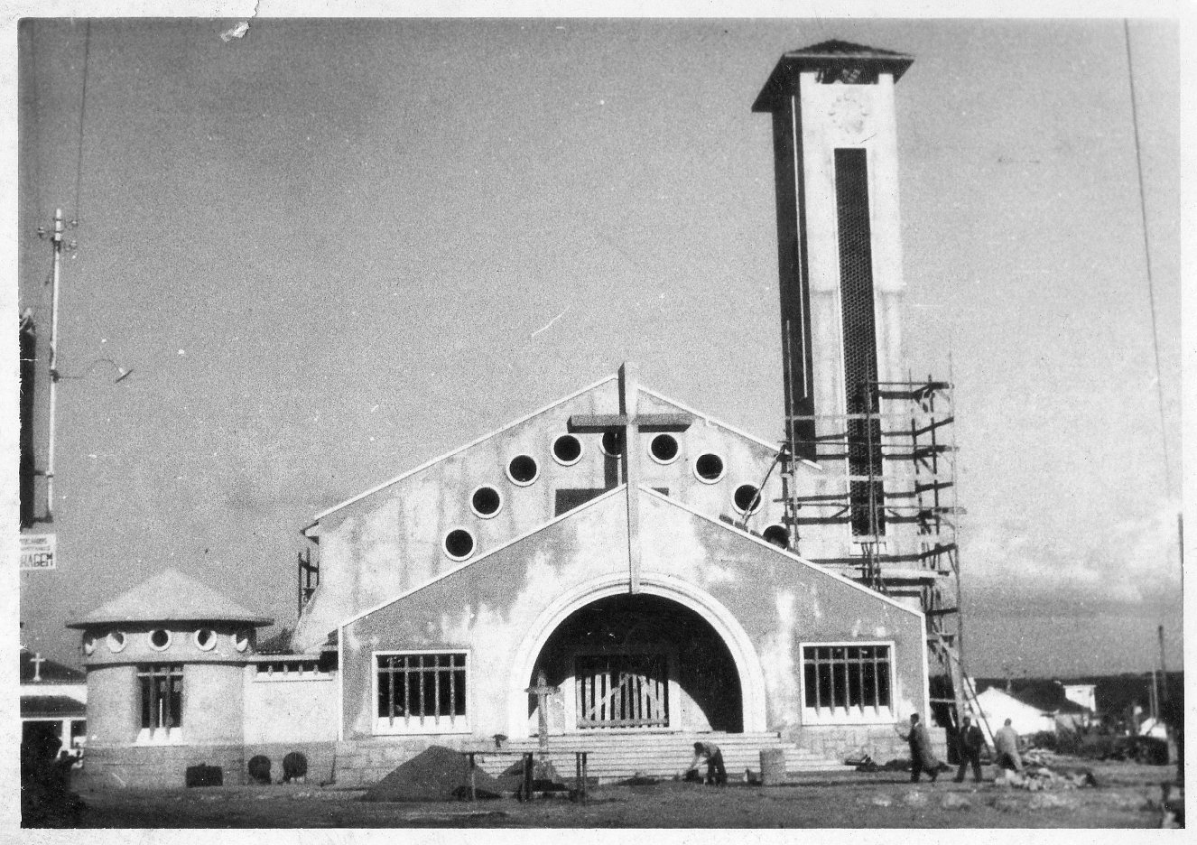 Igreja Silveira em Santa Cruz